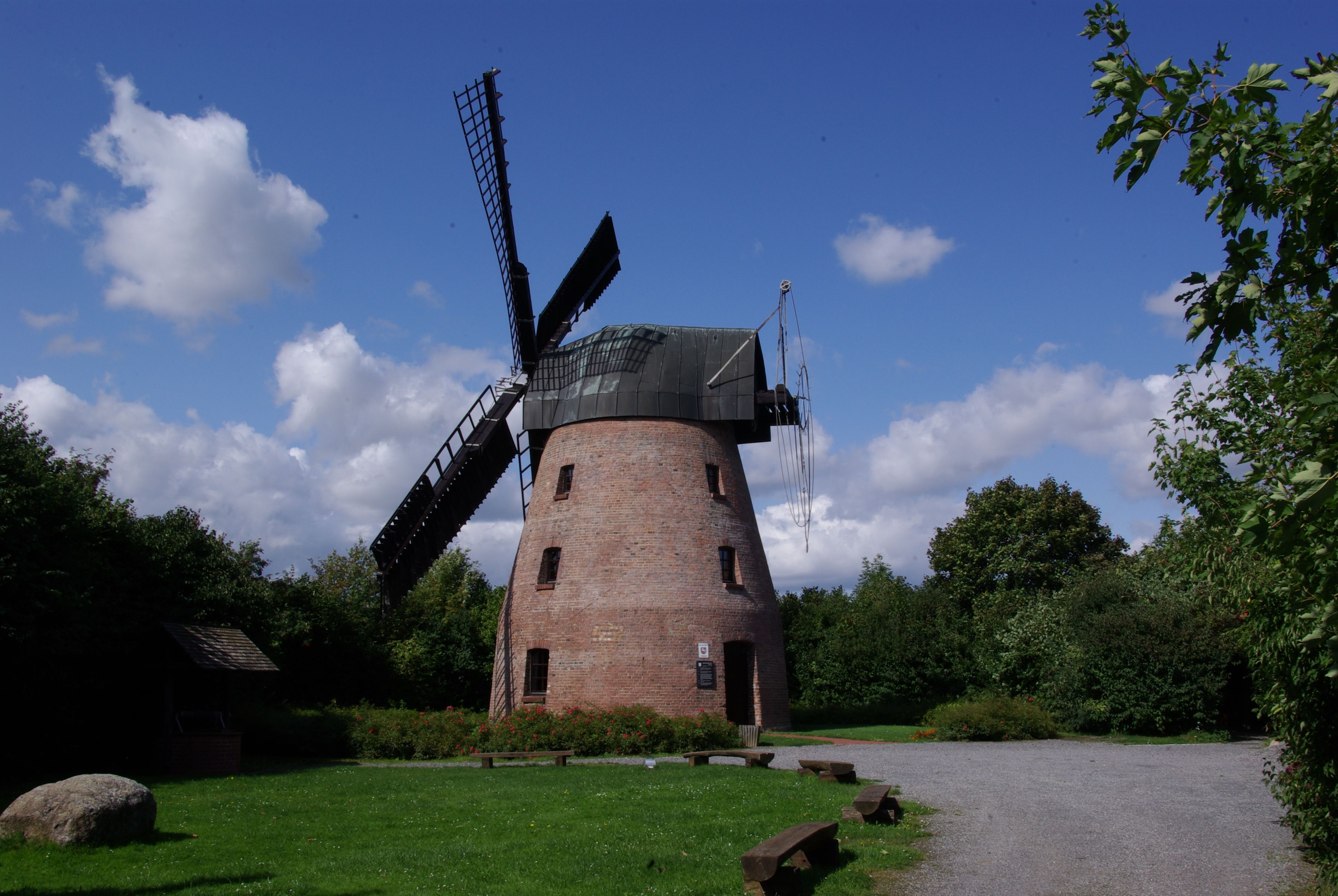 Söhlde, Niedersachsen, Deutschland, eine alte Mühle am Ortsrand. Die Mühle ist 1810 erbaut worden und war bis 1958 in Betrieb. Heute ist es das Standesamt der Gemeinde.